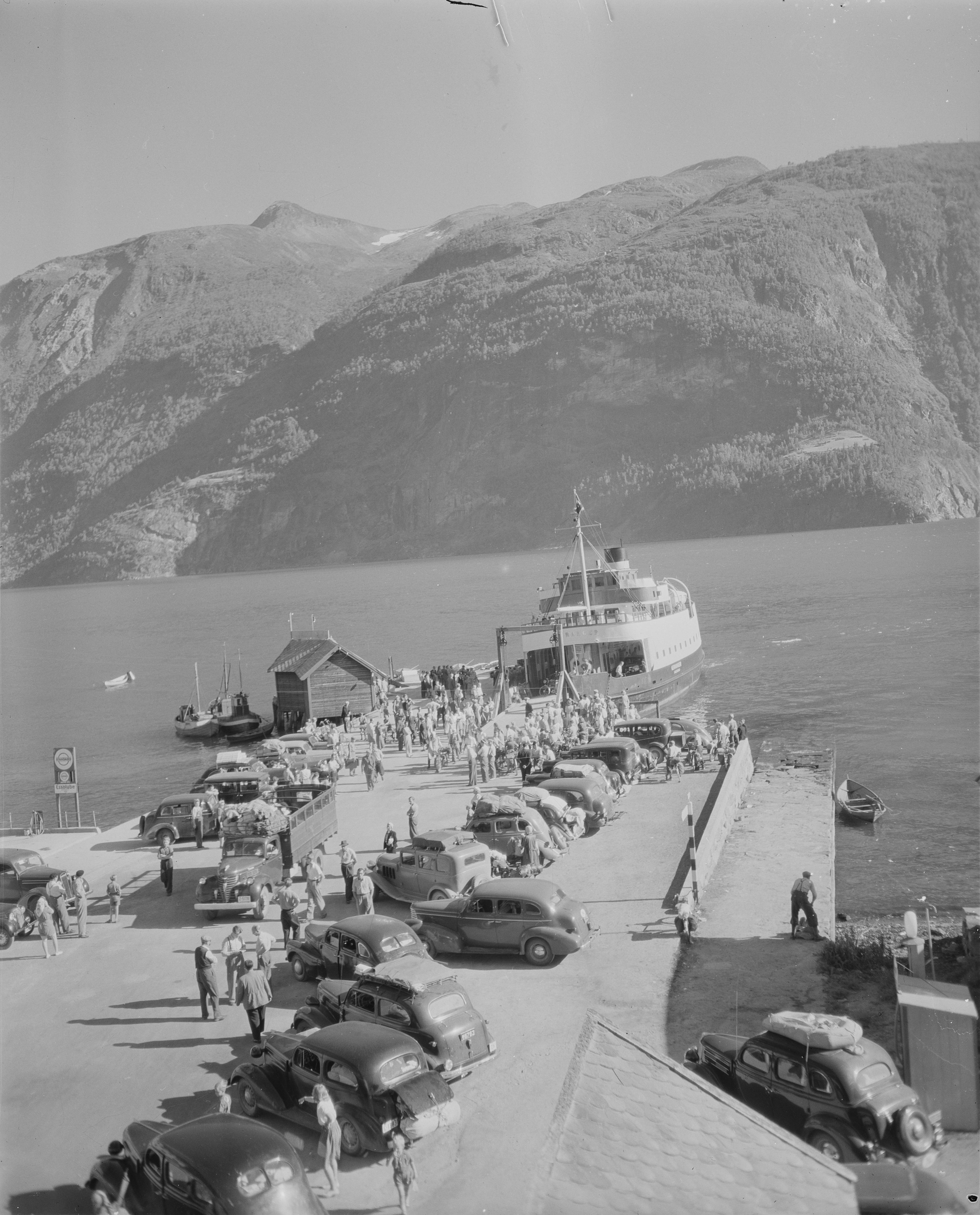 Bildet er hentet fra Nasjonalbibliotekets bildesamling. Anmerkninger til bildet var: Fotograf : ukjent Norddalsfjorden,Valldal, Norddal, Møre og Romsdal